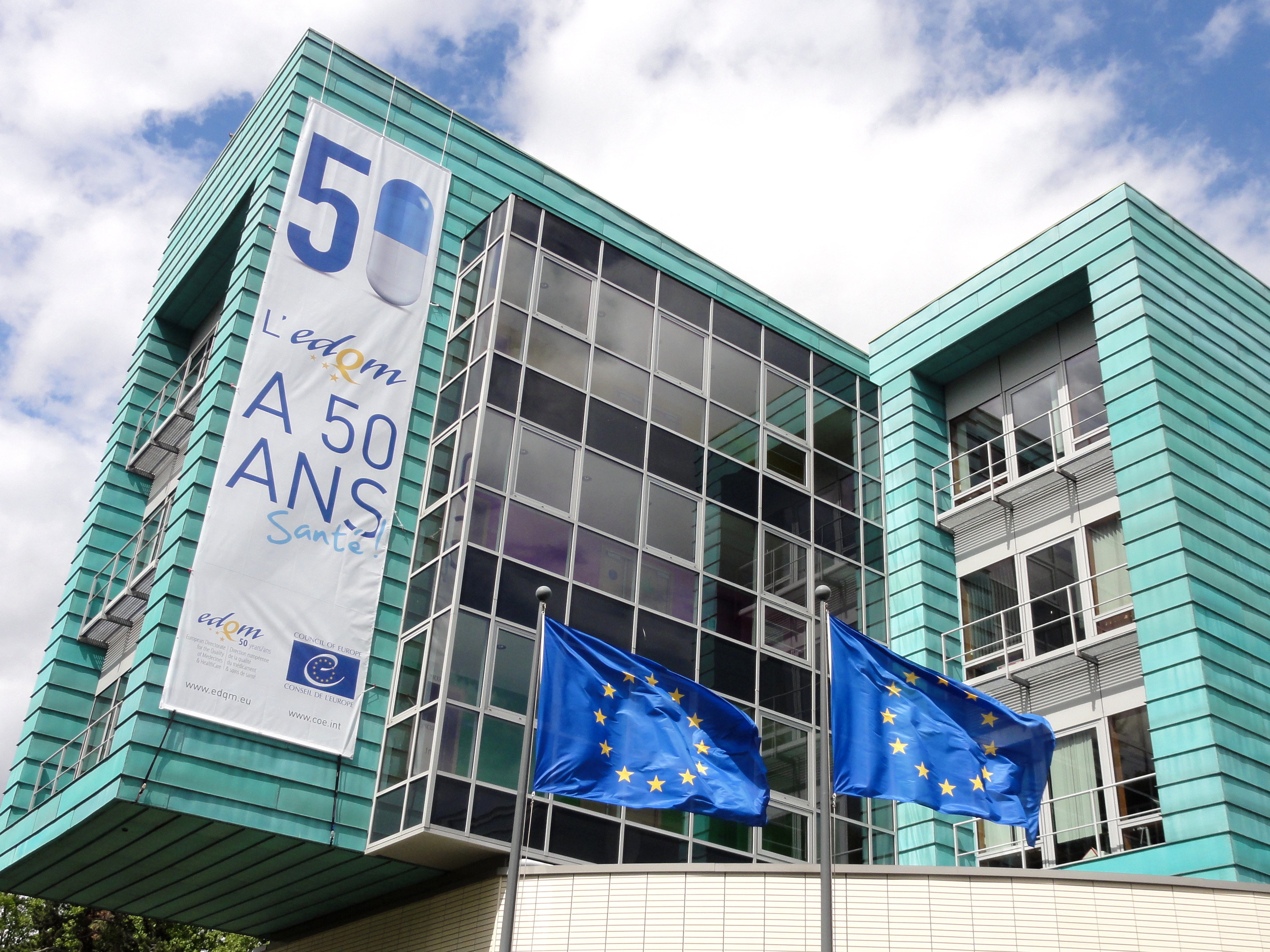 Alsace, Bas-Rhin, Strasbourg-Robertsau, Pharmacopée européenne, 7 allée Kastner.